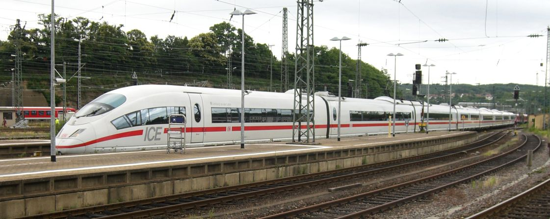 ICE Frankfurt–Paris entering Saarbrücken Hbf, Germany. ICE 3MF 406 083.